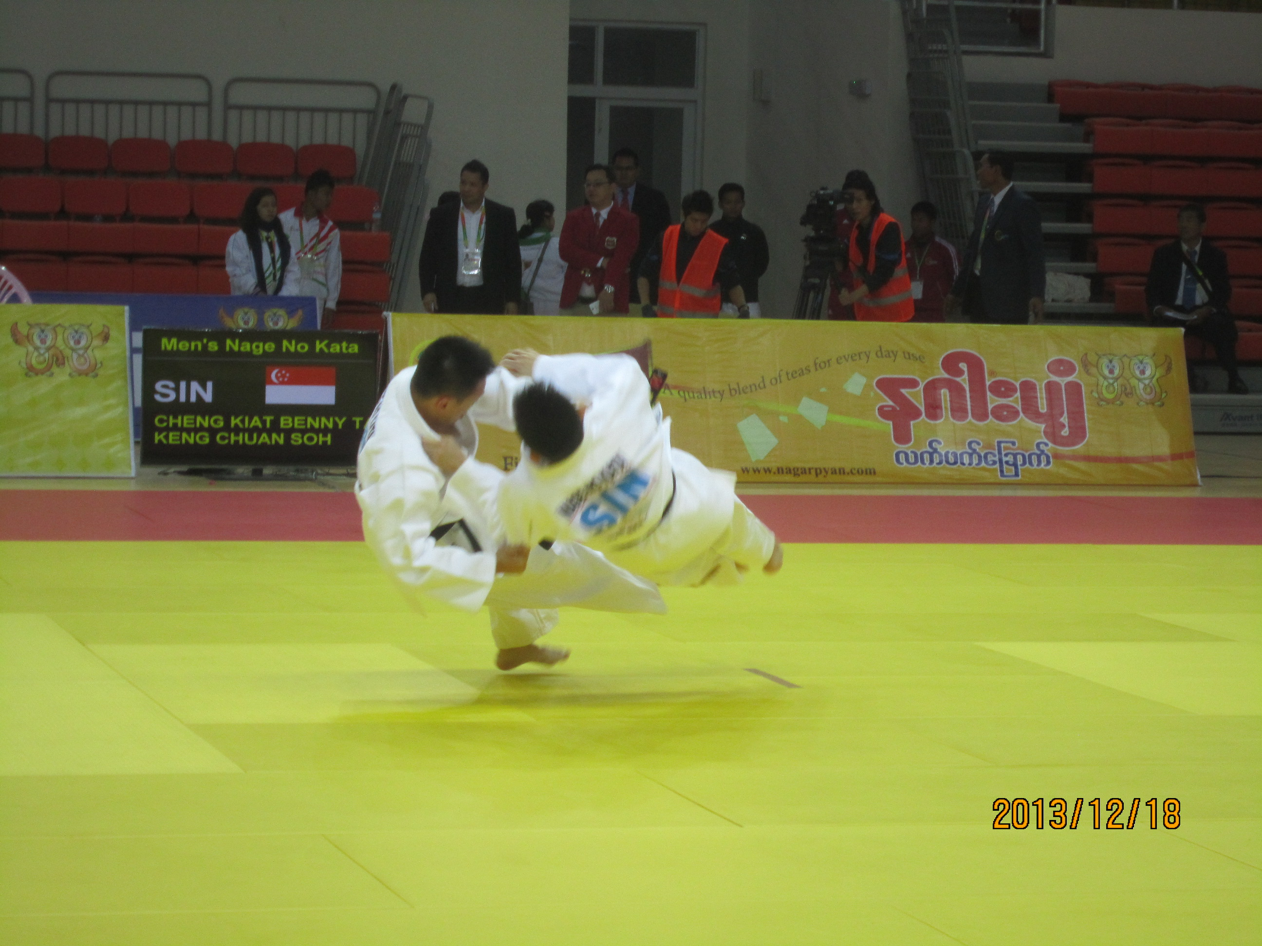 投の形の捨身技